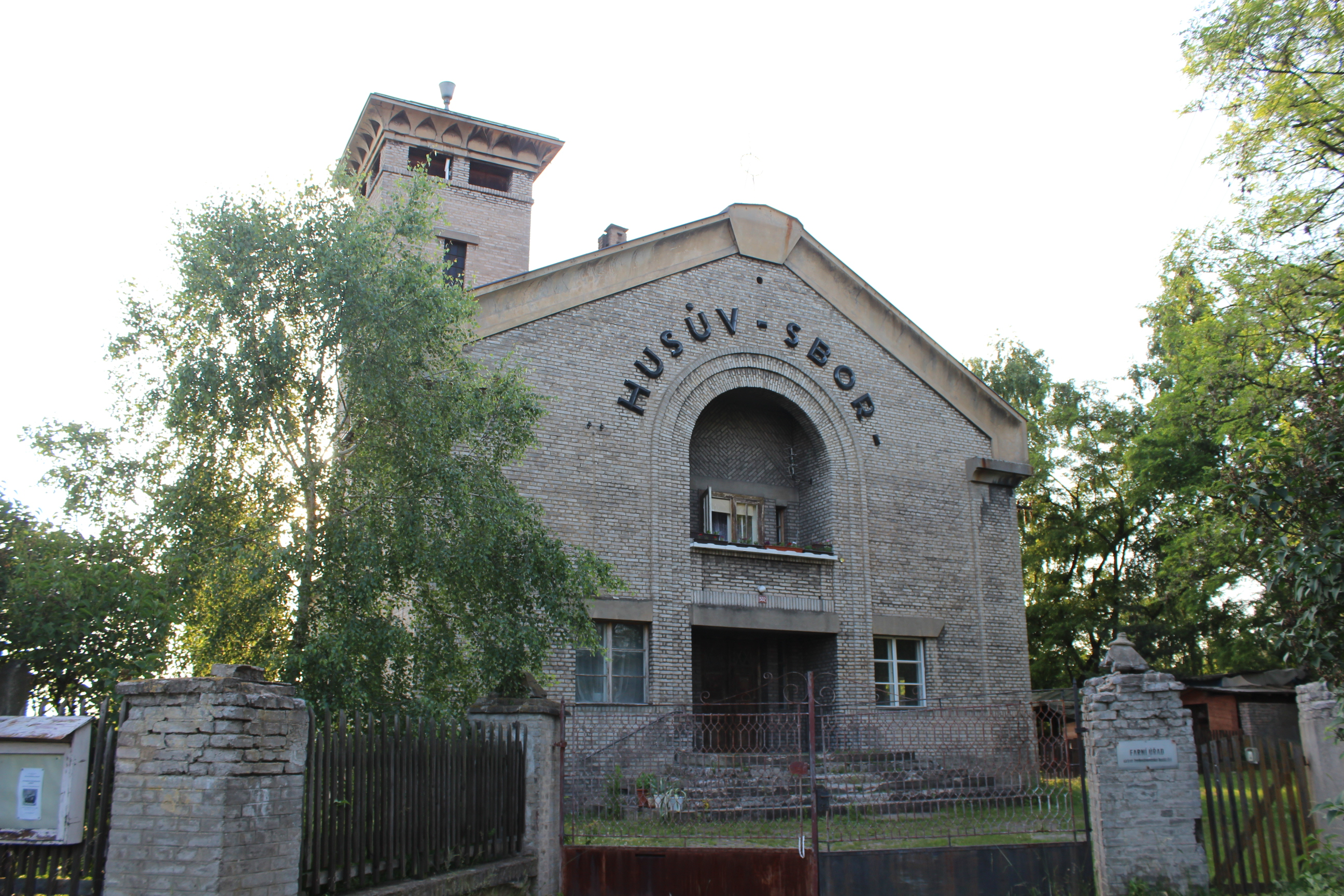 Památkově chráněný Husův sbor v Lužné v okrese Rakovník.